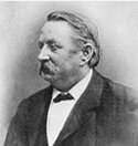 Hermann Haensch (1832–1896), Mechaniker und Optiker